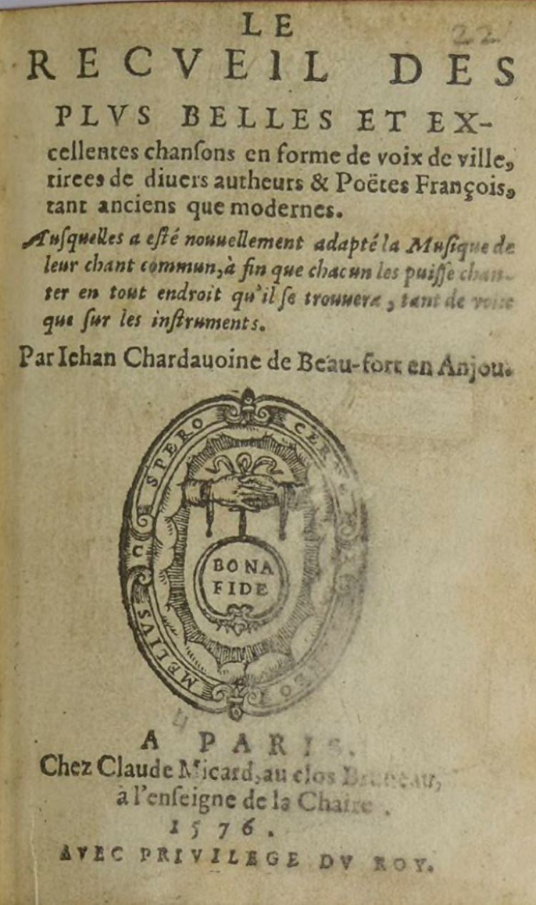 Title page of Jean Chardavoine's Recueil de chansons, Paris, 1576. (Paris BNF).